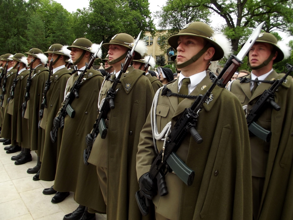 Zdjęcie zrobione podczas tradycyjnej procesji z Wawelu na Skałkę w Krakowie.